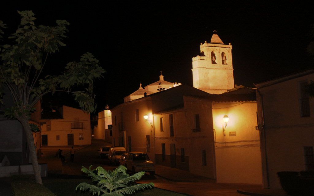 Santa Ana